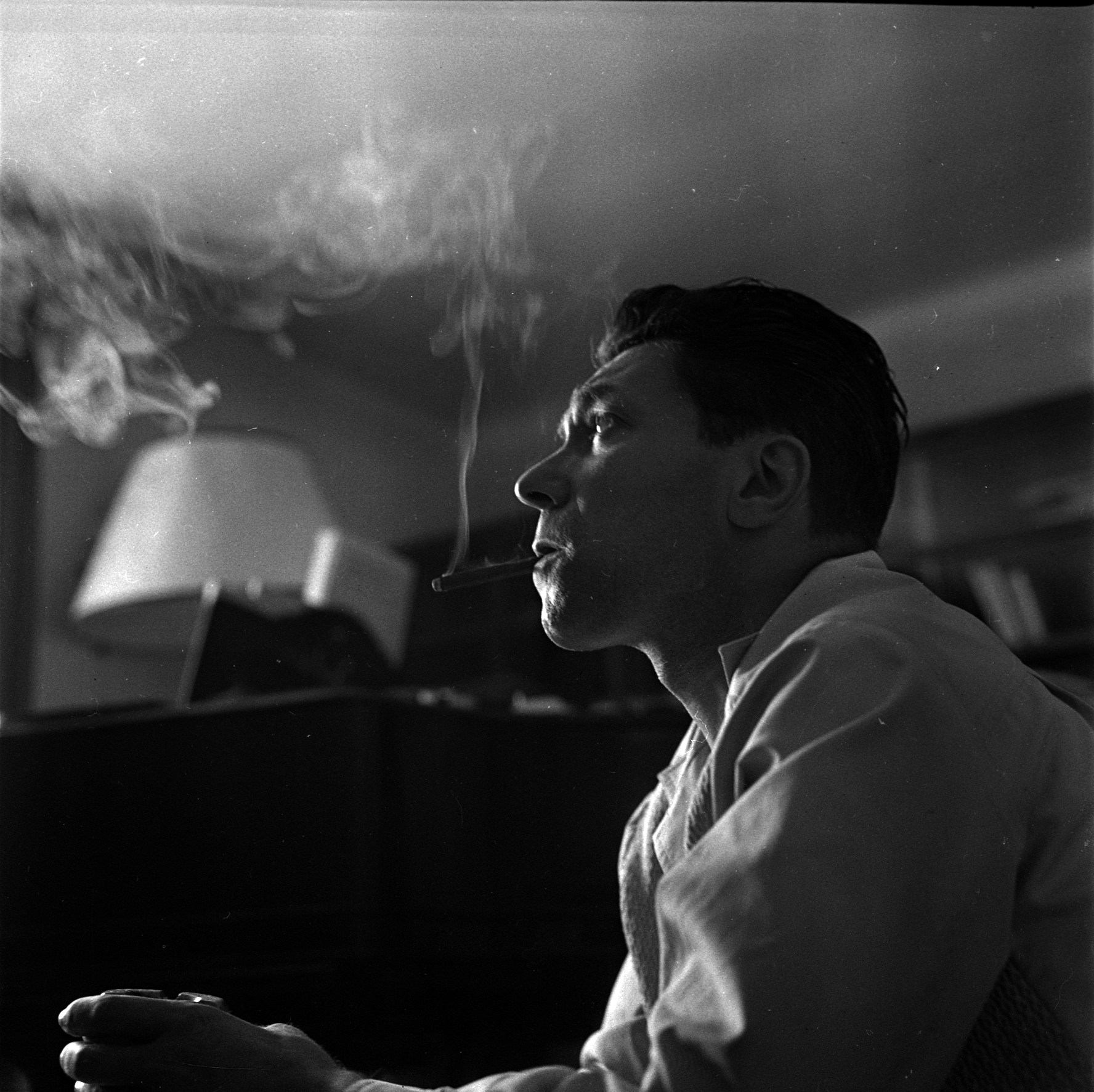 intérieur d'un appartement Toulousain, 18 rue Agathoise. 11 septembre 1961. Portrait de profil en buste de Louis Auriacombe, chef de l'orchestre de musique de chambre de Toulouse, fumant un cigare.